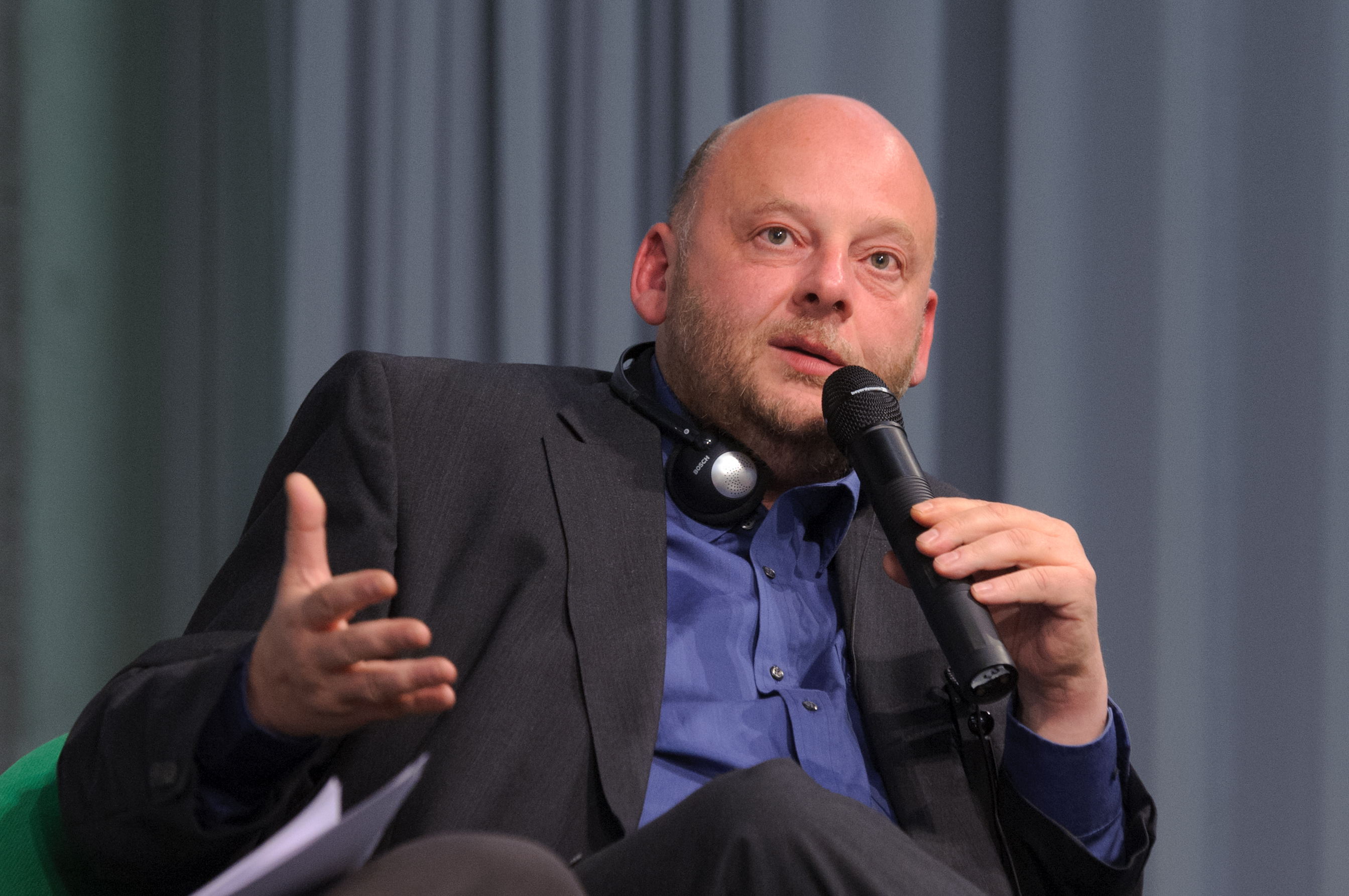 Thomas Hettche (Schriftsteller, Deutschland) Deutsch-Israelische Literaturtage 2012 Die deutsch-israelischen Literaturtage - organisiert vom Goethe-Institut und der Heinrich-Böll-Stiftung - finden seit sechs Jahren abwechselnd in Berlin und in Tel Aviv statt. Neben Lesungen und Diskussionen gibt es im April auch Filme zu sehen. Abgeschlossen wird *beziehungsweise(n)* durch eine Diskussionsrunde, in der Aktivist/innen, Journalist/innen und Autor/innen über den Begriff der Solidarität, über gesellschaftliche Vorstellungen des Zusammenhalts und der sozialen Gerechtigkeit debattieren. Foto: Stephan Röhl